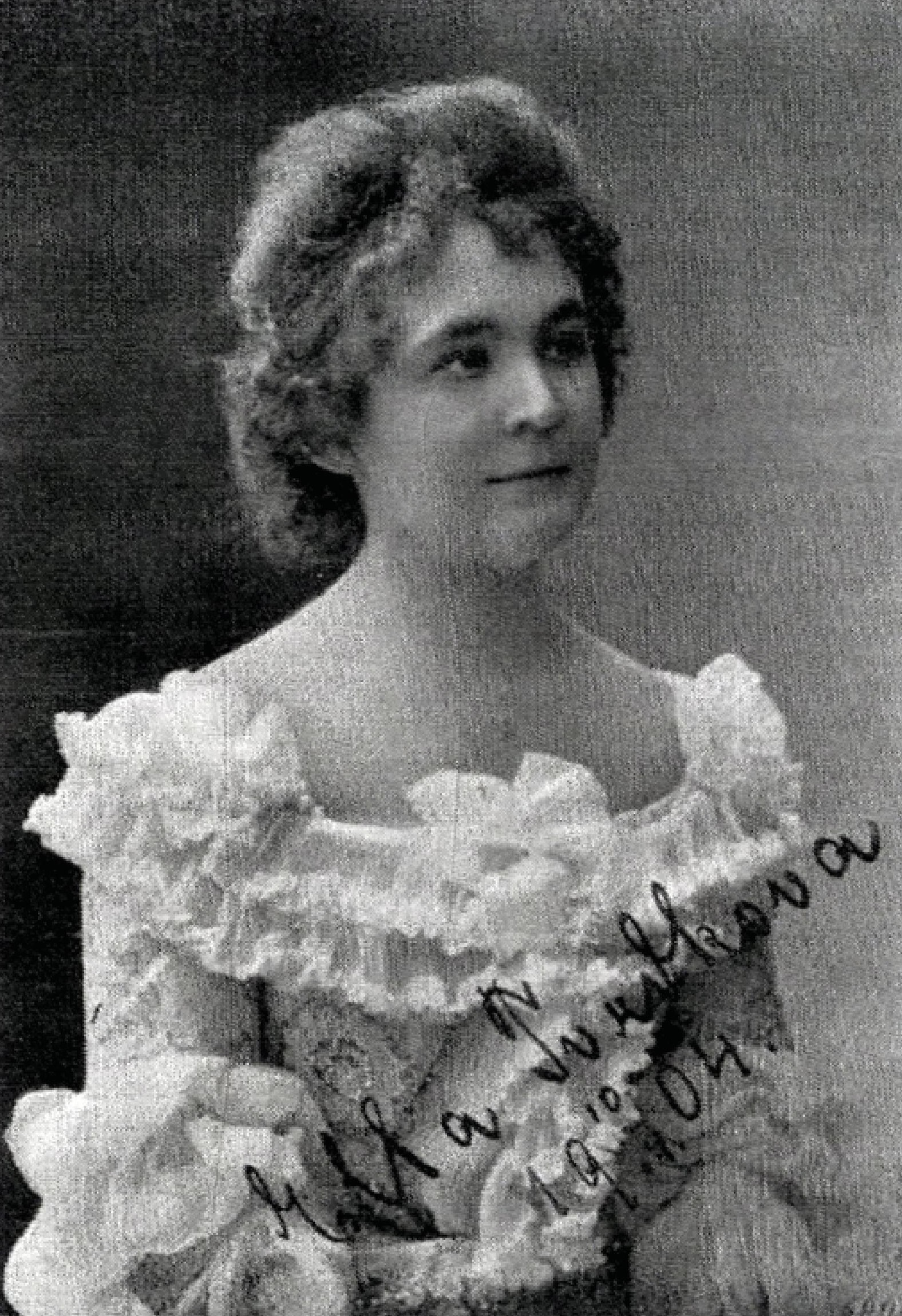 Ella Tvrdková, česká operní pěvkyně